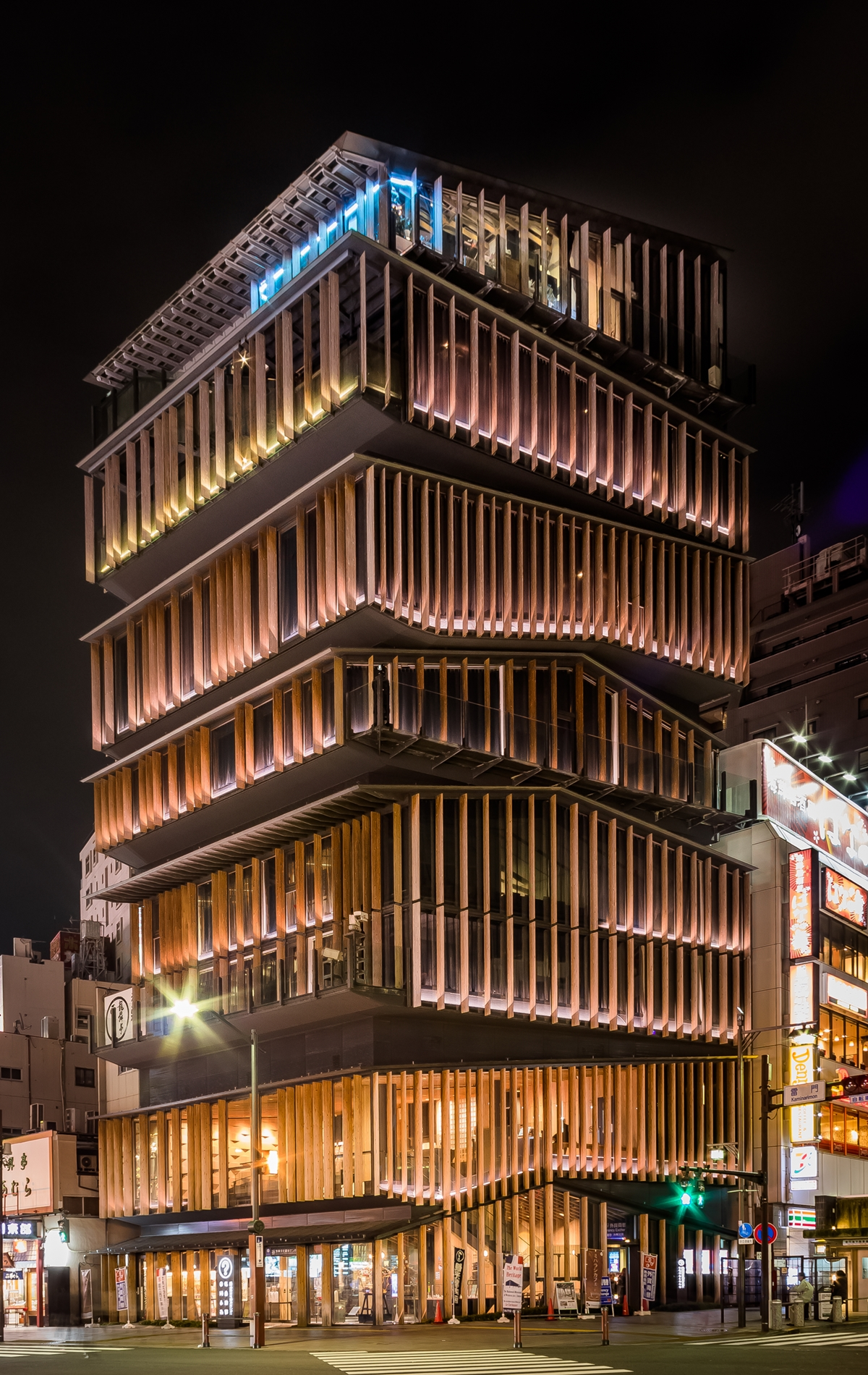 浅草文化観光センター（東京都台東区）のライトアップ。 設計: 隈研吾